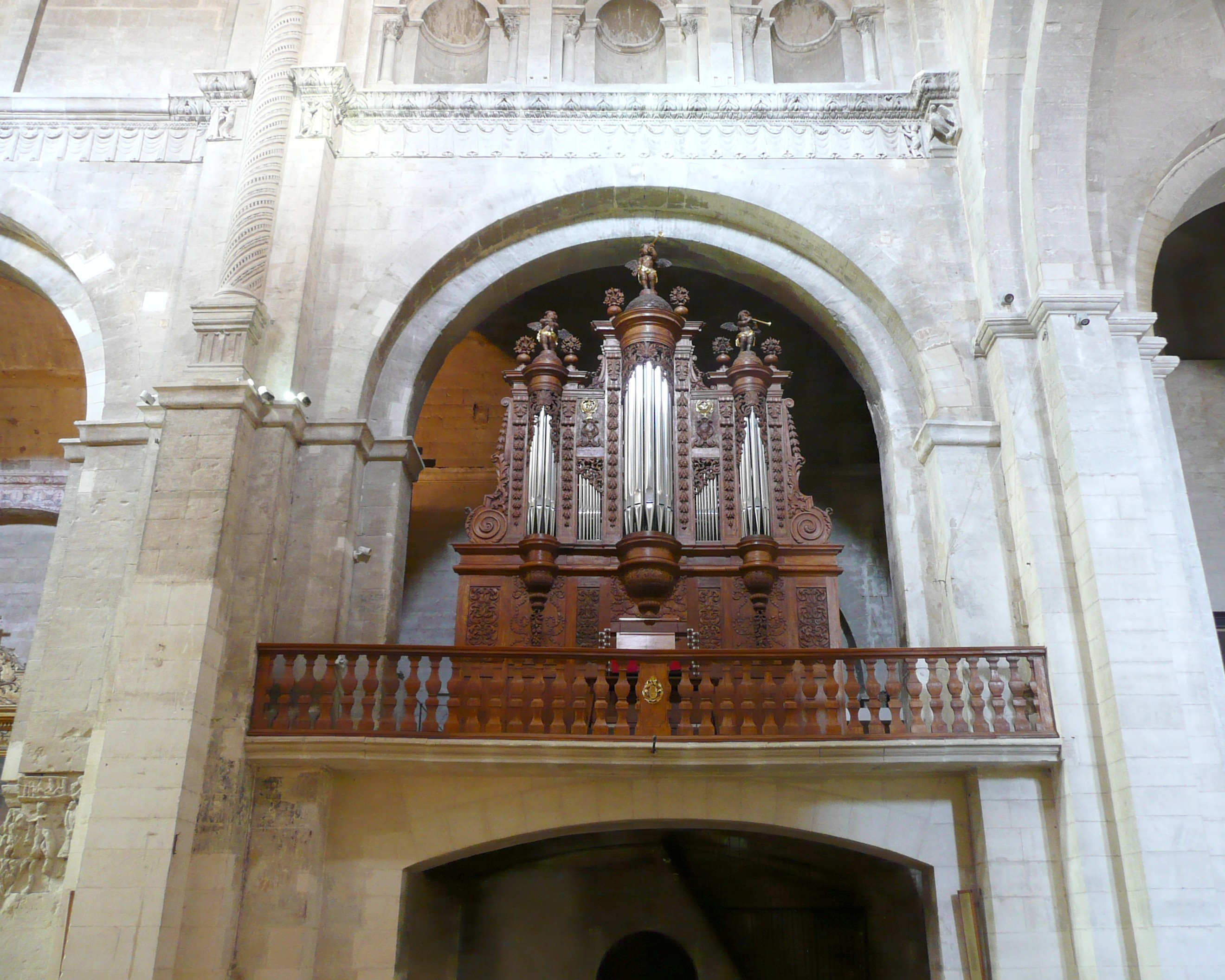 Saint-Paul-Trois-Châteaux (Drôme, France), intérieur de l'ancienne cathédrale, aujourd'hui église paroissiale Notre-Dame.